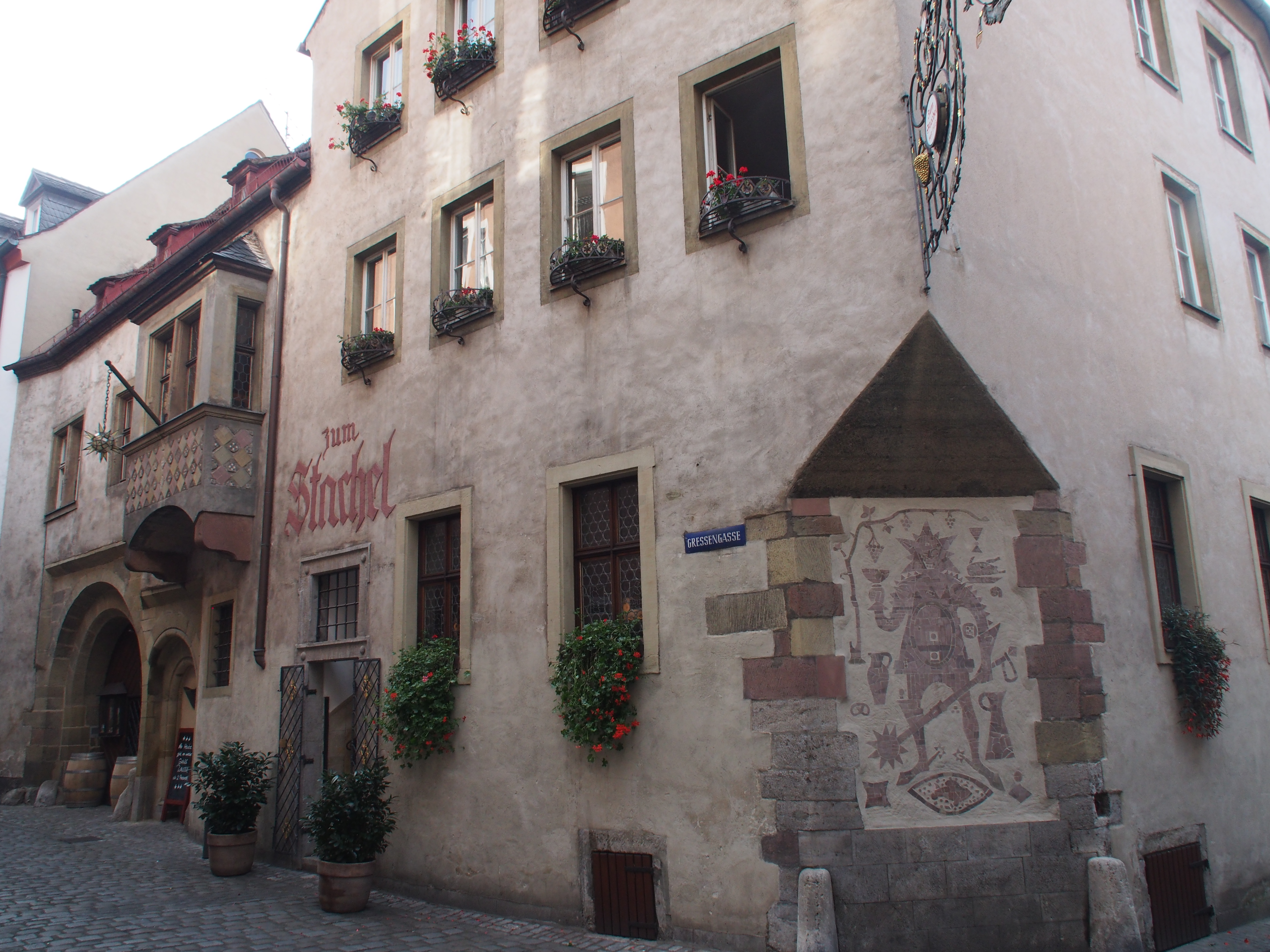 Gasthaus "Zum Stachel", Gressengasse in Würzburg, ältestes Gasthaus der Stadt, erstmals 1319 urkundlich erwähnt